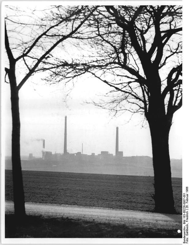 Freiberg, VEB Bergbau- und Hüttenkombinat "Albert Funk" Zentralbild Gahlbeck 26.2.1966 Industrielandschaft im Bezirk Karl-Marx-Stadt Die ständig rauchenden Schornsteine des VEB Bergbau- und Hüttenkombinat "Albert Funk" bestimmen das Bild der alten Bergstadt Freiberg.